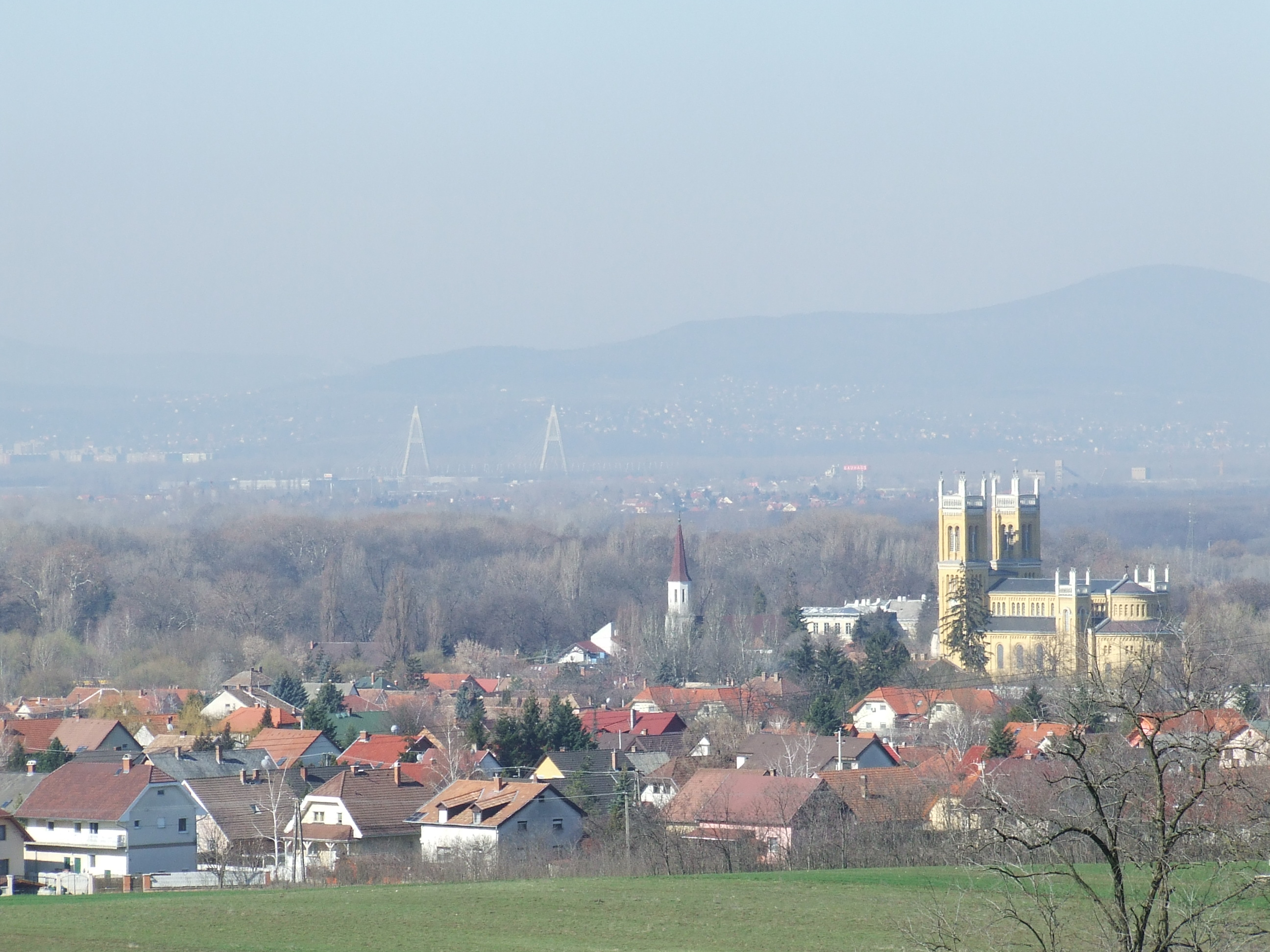 Fóti kilátás